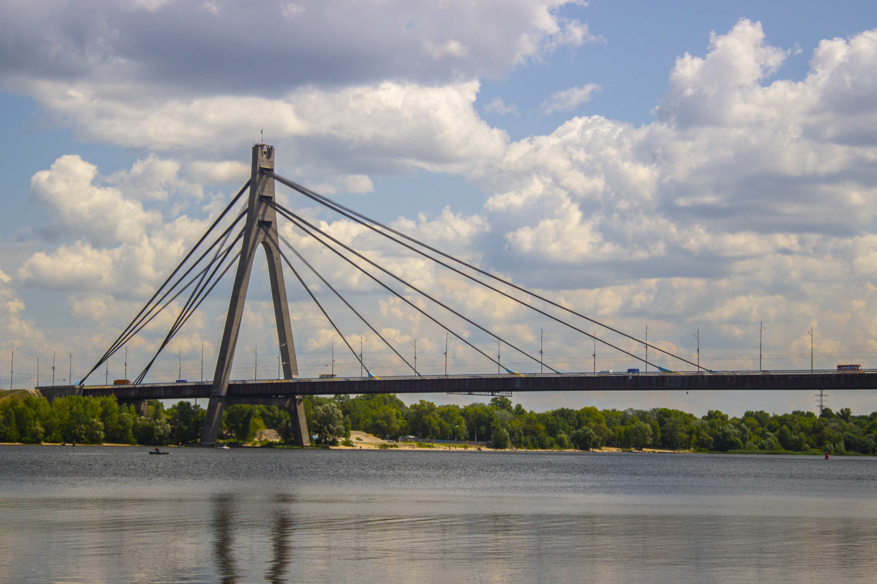 Північний міст, Київ, пр-т С. Бандери